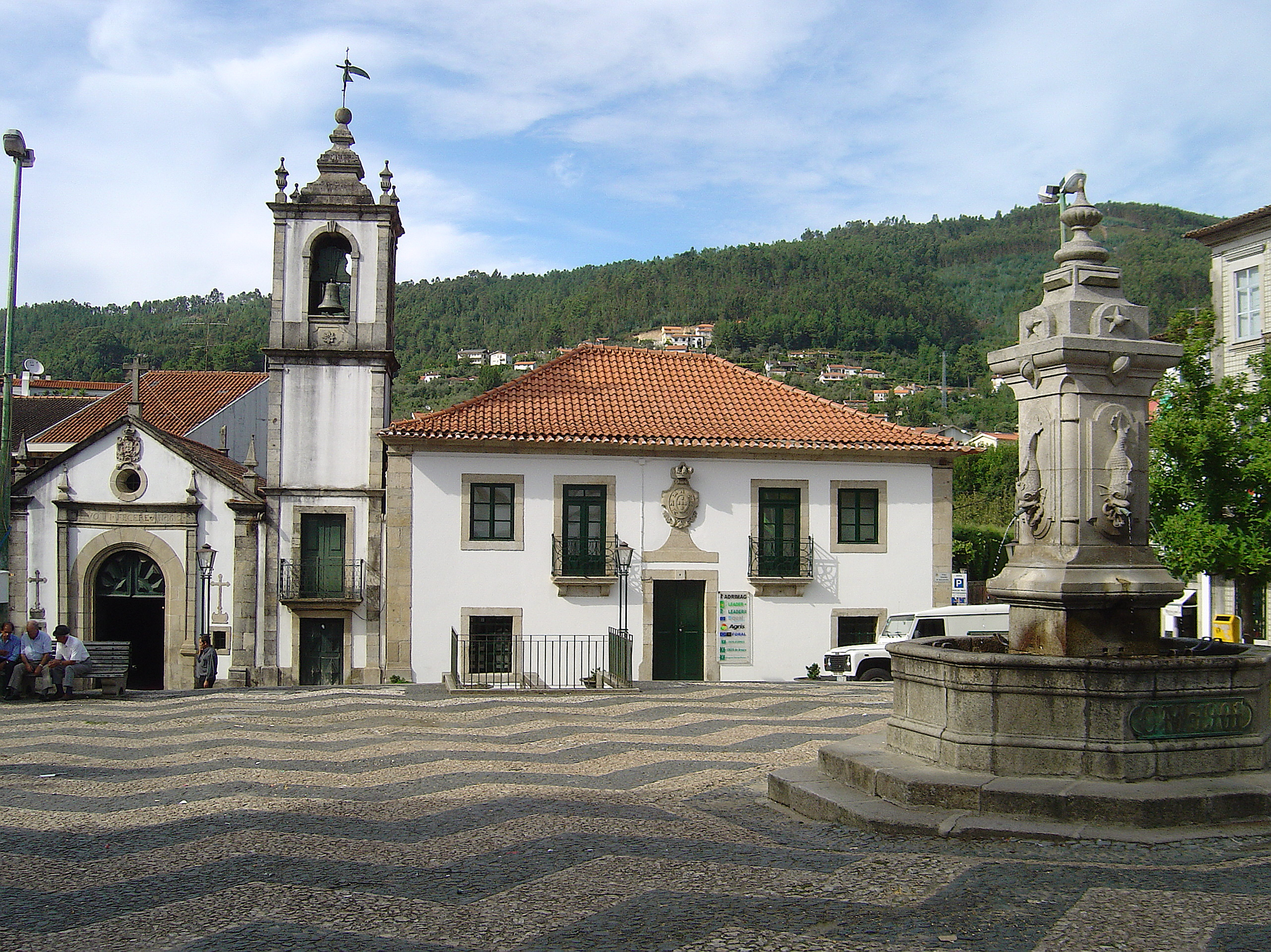 Arouca Fotografia de Vitor Oliveira, integrada na colecção com o endereço